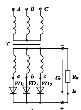 Однопівперіодна трифазна схема випрямлення